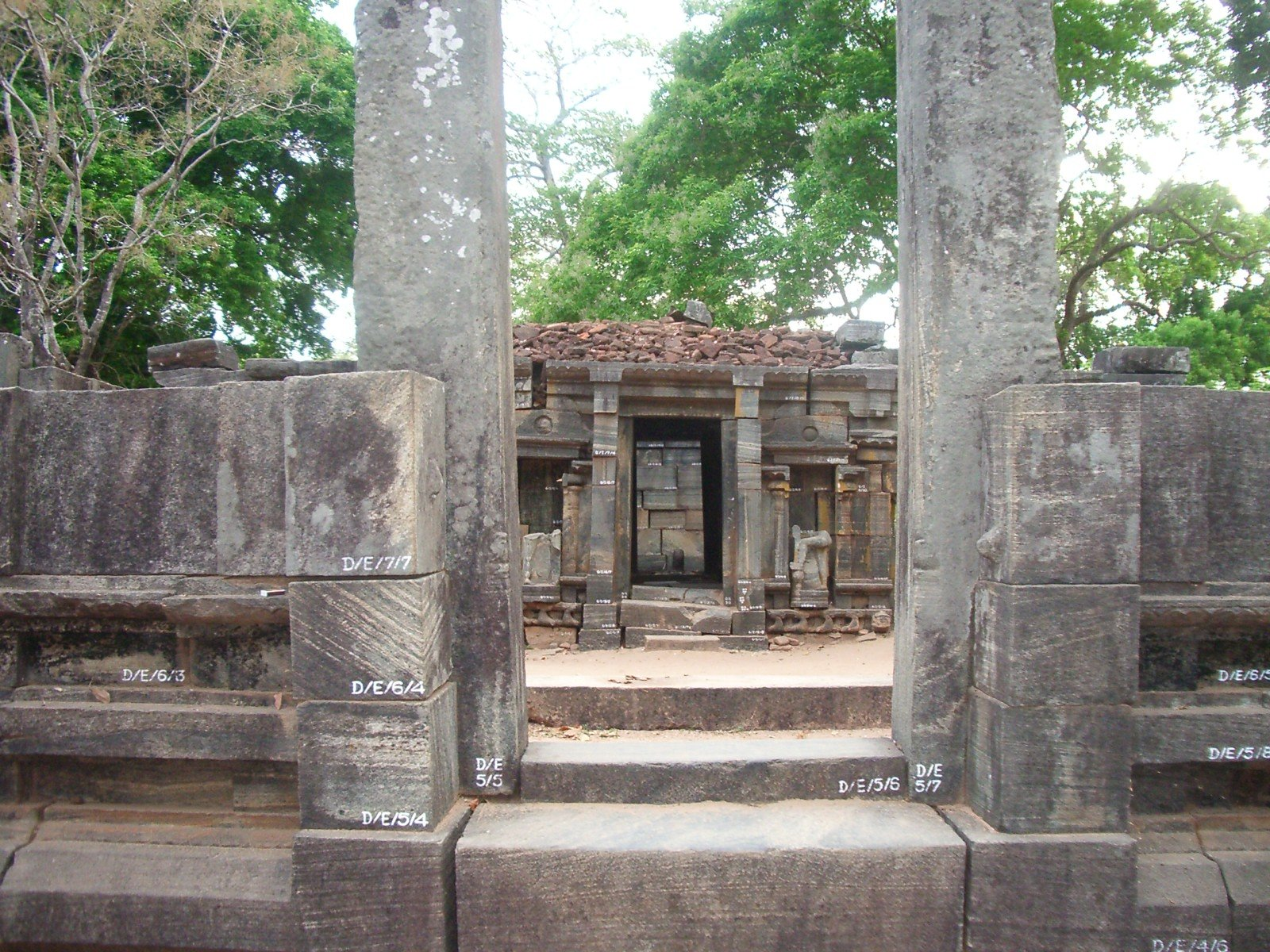 Temple en reconstrucció a Polonnaruwa; foto feta per J. Ollé el juliol del 2006